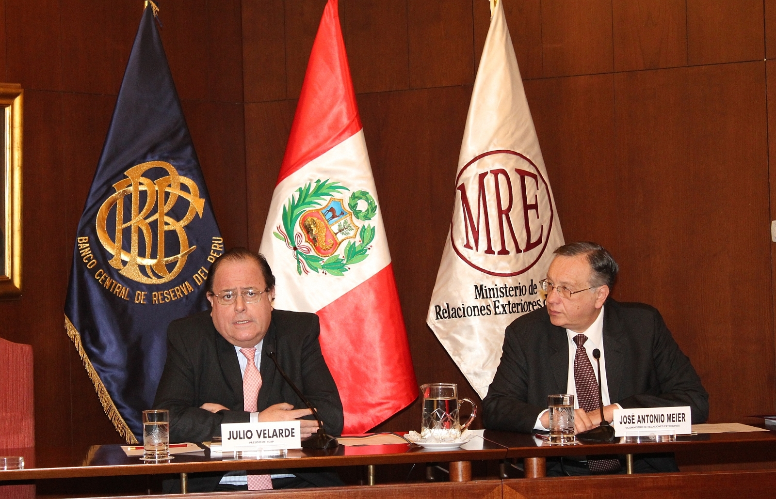 El Vicecanciller, Embajador José Antonio Meier, participó junto al Presidente del Banco Central de Reserva del Perú, Julio Velarde, en un evento organizado por el Centro de Desarrollo de la OCDE en que se difundió el informe “Perspectivas Económicas de América Latina 2012: Transformación del Estado para el Desarrollo”, que contiene un importante diagnóstico de la realidad política y socio-económica de la región latinoamericana y plantea una reflexión sobre el rol que el Estado debe asumir para hacer posible el desarrollo de nuestros países. (Foto: Banco Central de Reserva del Perú)